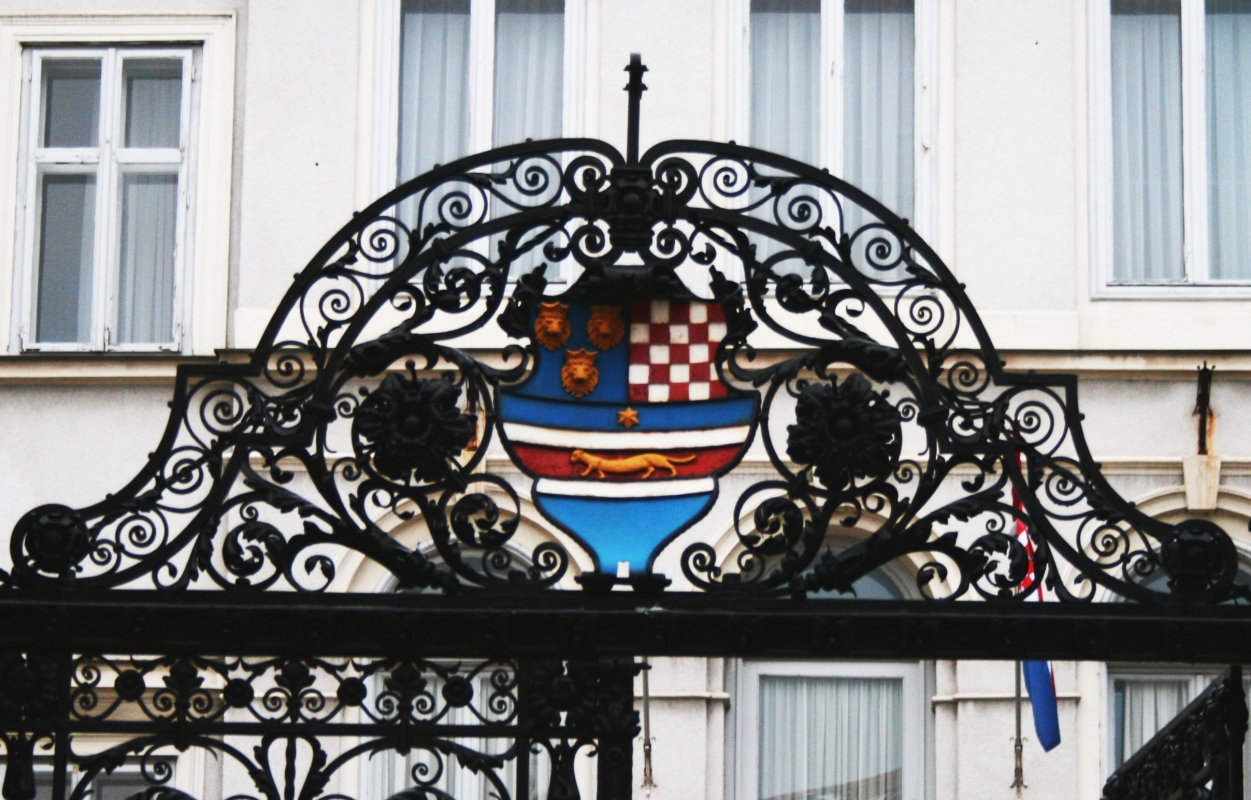 ulazna vrata s grbom Trojednice na željeznoj dvorišnoj ogradi zgrade Hrvatskog instituta za povijest, iskovanoj u zagrebačkoj Obrtnoj školi, Zagreb, Hrvatska